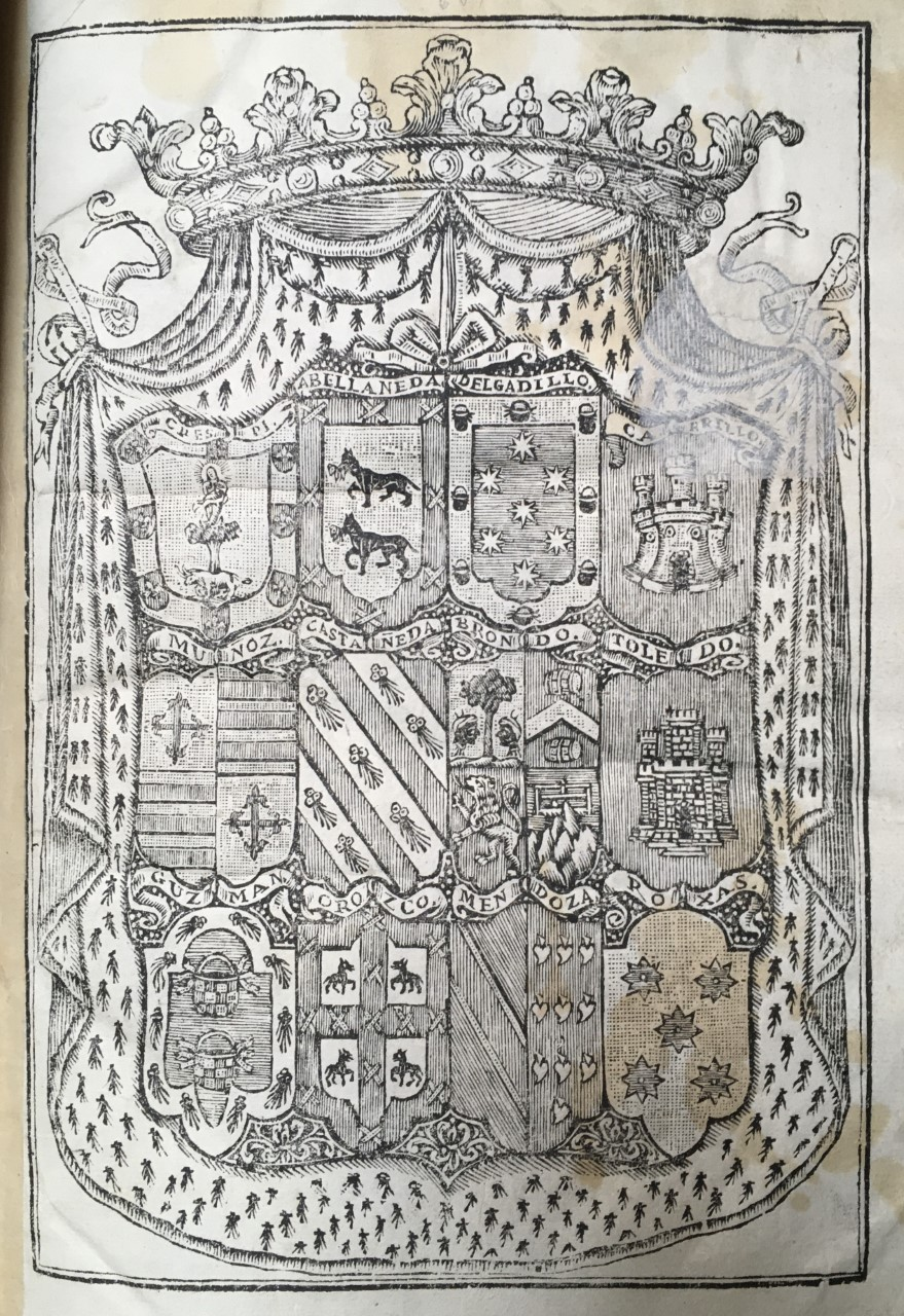 Este escudo lleva las armas de Joseph Francisco Crespí de Valldaura, Conde de Orgaz, Castrillo y Sumacárcer, Marqués de Villasidro y Palmas, Barón de Callosa y Joyosa-Guarda. Pertenece a la obra de Joseph de los Ríos Carquero. Papel Genealógico ... de las Casas de Crespí de Valldaura ... [Madrid], 1745.